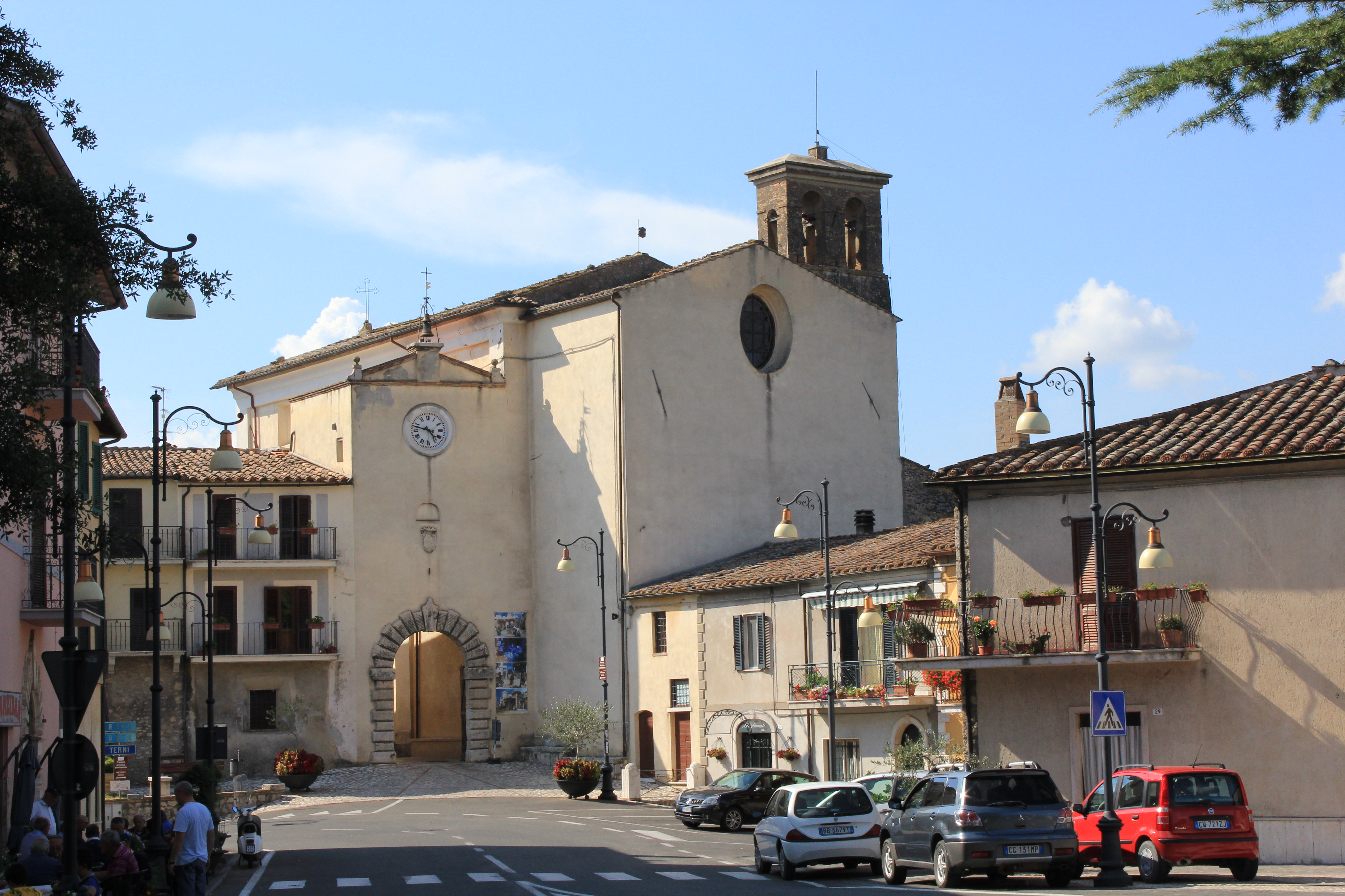 Penna in Teverina , Terni, Umbria, Italia. Porta di ingresso a "Penna in Teverina vecchia", la parte più vecchia della città, ed abside della Chiesa di Santa Maria della Neve.